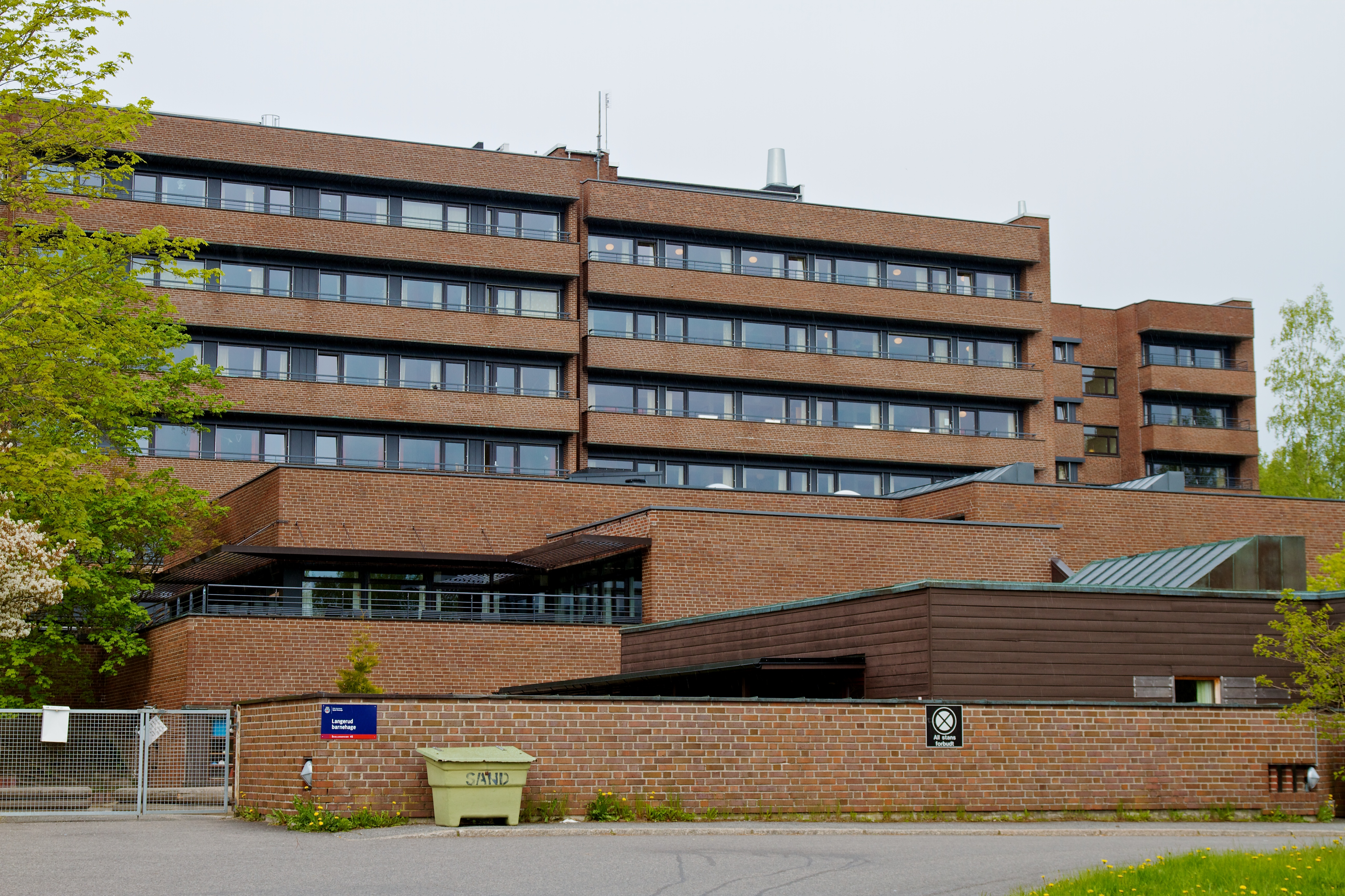 Langerud sykehjem i Oslo.